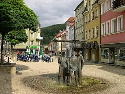 Bad Brückenau Stadt Jinm